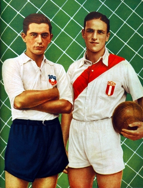 Raúl Toro (Chile) y Lolo Fernández (Perú). Original caption: RAUL TORO y LOLO FERNANDEZ, CENTRE - FORWARDS DE CHILE Y PERU EN EL CAMPEONATO SUDAMERICANO DE FUTBOL